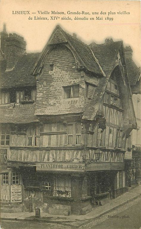 La maison médiévale du 14e siècle à Lisieux, Calvados. C'est un Manoir à pans de bois en encorbellement aux façades à colombages. Elle est connue sous le nom de « maison du cirier Plantefor ». Monsieur Plantefor était le cirier de la cathédrale Saint-Pierre de Lisieux. Elle était située à l'angle de la rue du Paradis et la grande-rue, qui est devenue aujourd'hui la rue Henry-Chéron. Elle a été démolie en mai 1899.